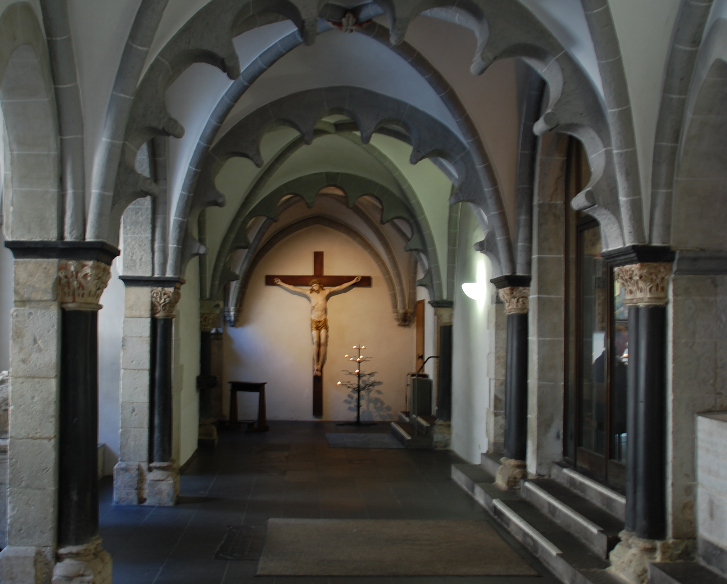 St. Andreas, Köln Altstadt-NordThis is a photograph of an architectural monument.